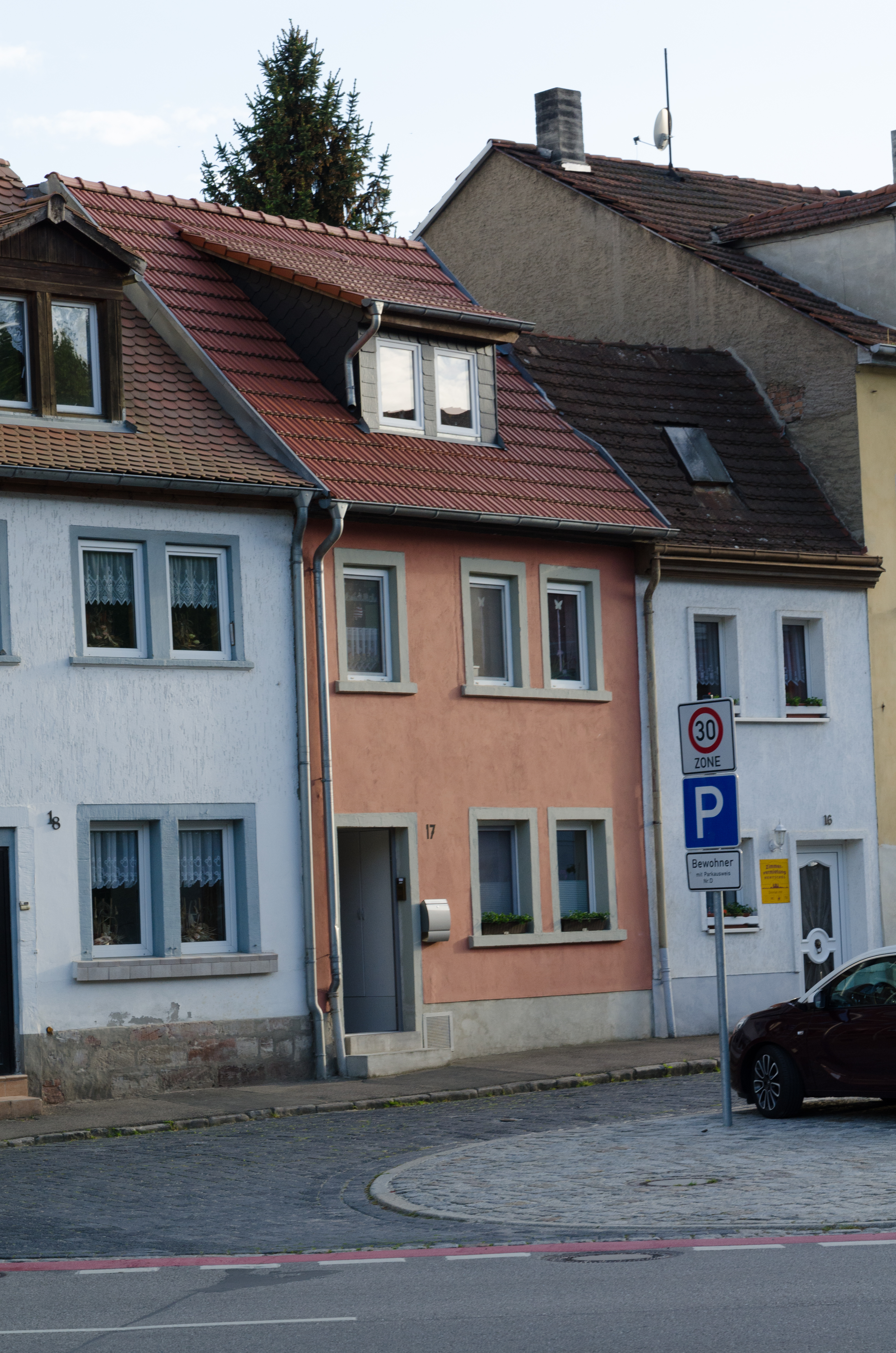 Naumburg, Lindenhof 17